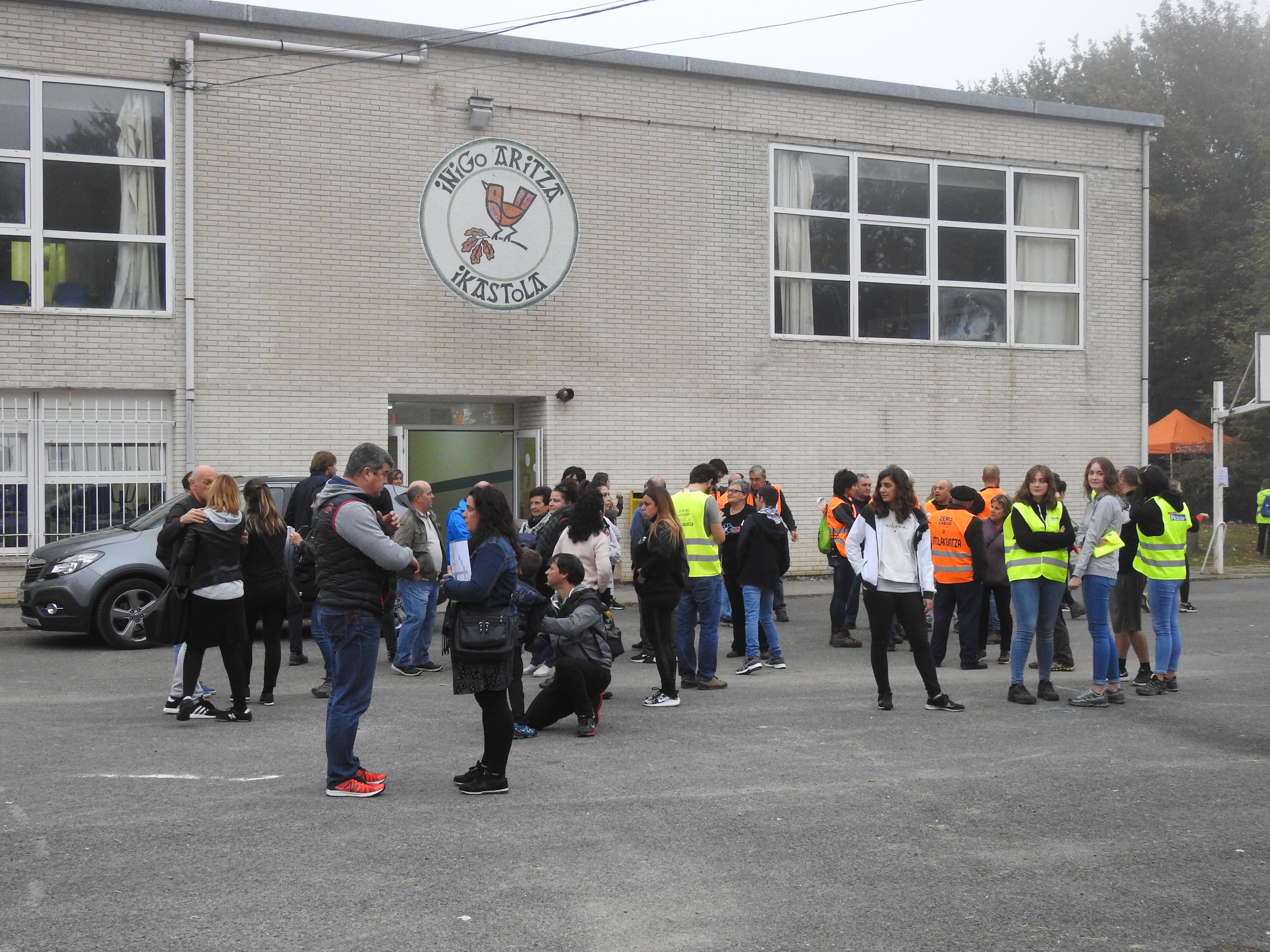 Altsasuko Iñigo Aritza ikastolaren kanpokaldea, 2018ko Nafarroa Oinez egunean